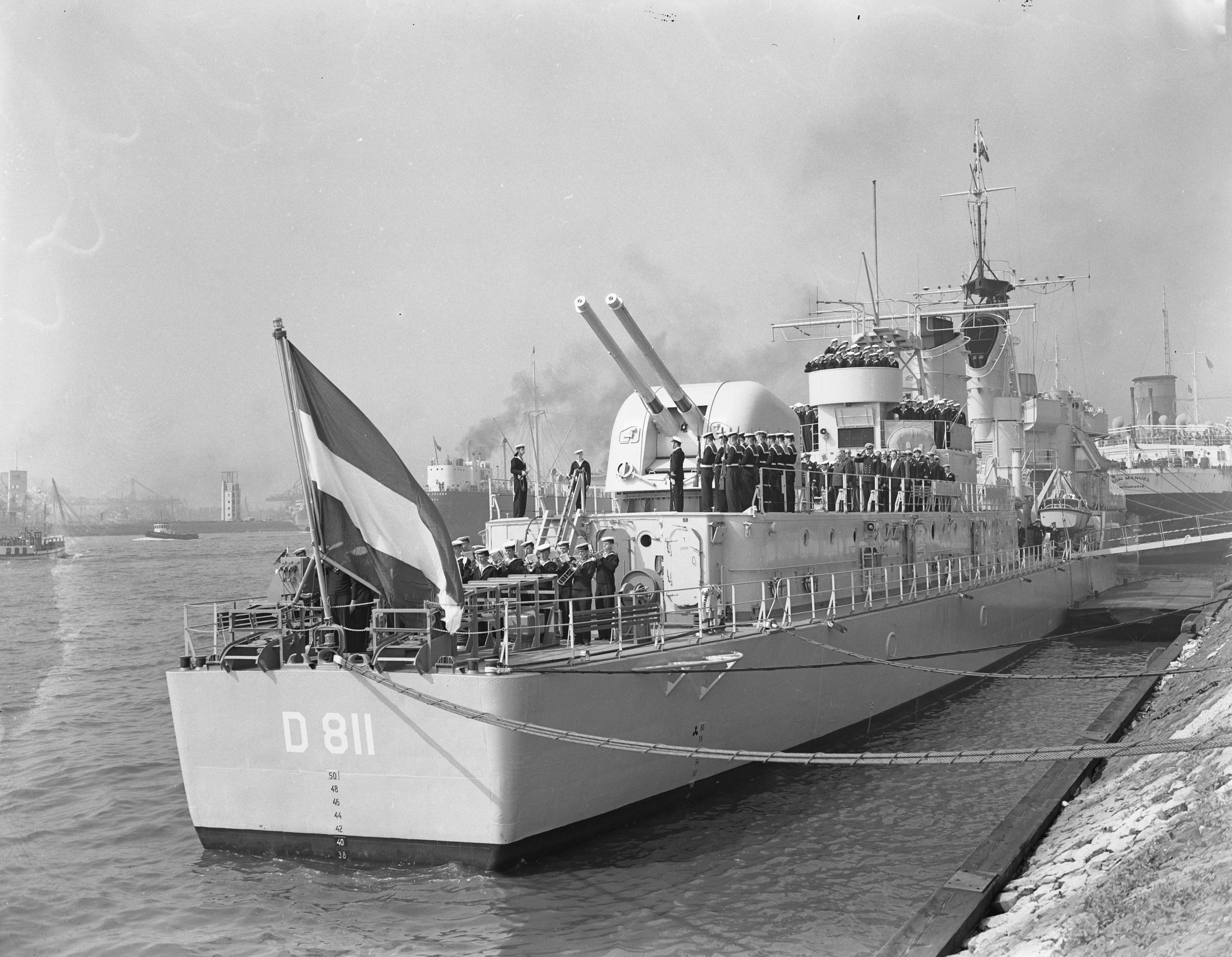 Collectie / Archief : Fotocollectie Anefo Reportage / Serie : [ onbekend ] Beschrijving : Indienststelling onderzeebootjager "Gelderland" Rotterdam Datum : 17 augustus 1955 Locatie : Rotterdam, Zuid-Holland Trefwoorden : Indienststellingen, onderzeebootjagers Fotograaf : Pot, Harry / Anefo Auteursrechthebbende : Nationaal Archief Materiaalsoort : Negatief (zwart/wit) Nummer archiefinventaris : bekijk toegang 2.24.01.04 Bestanddeelnummer : 907-2823